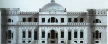 Эскиз фасада усадебного дома в Троицком-Кайнарджи